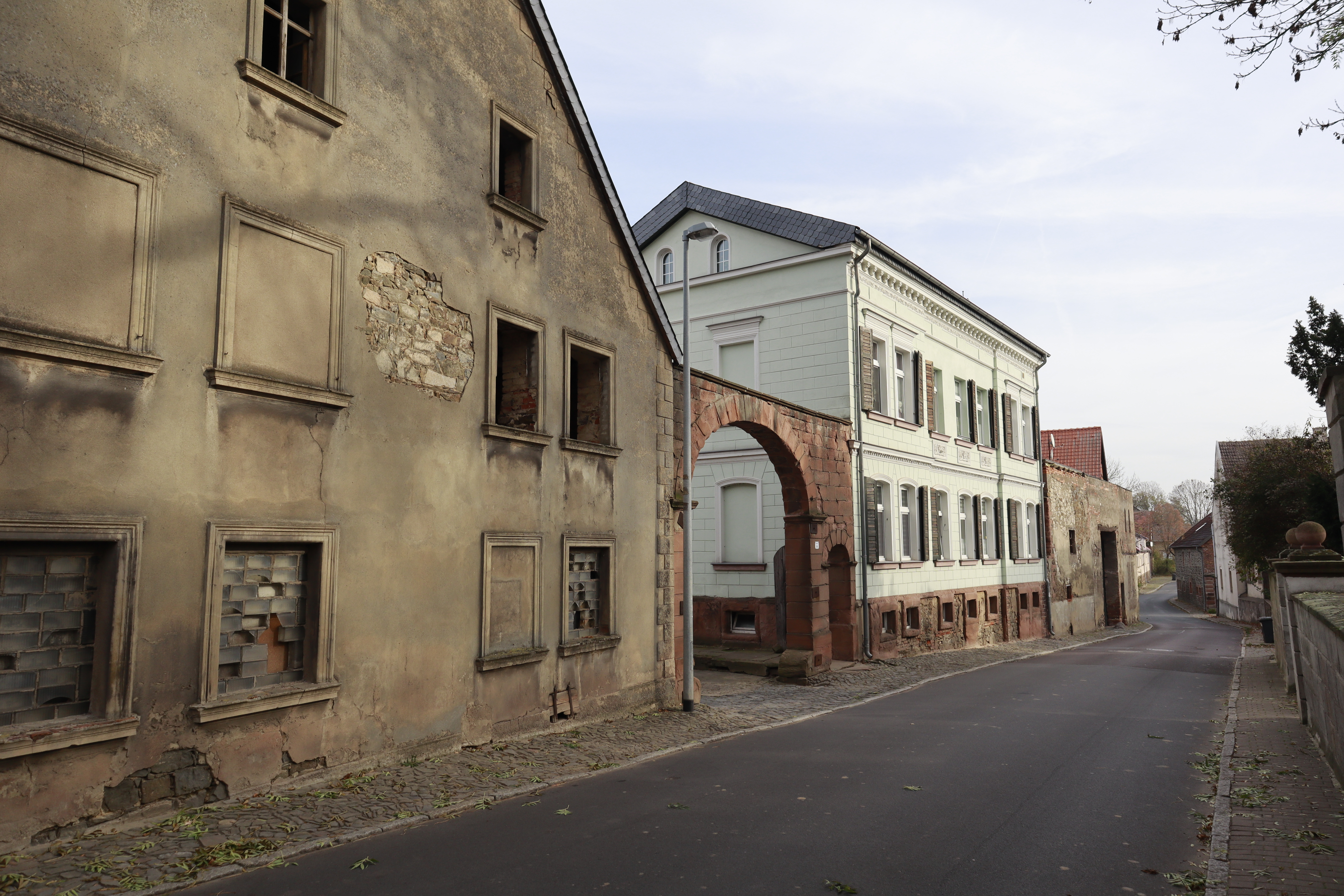 Hundisburg, Hauptstr. 36